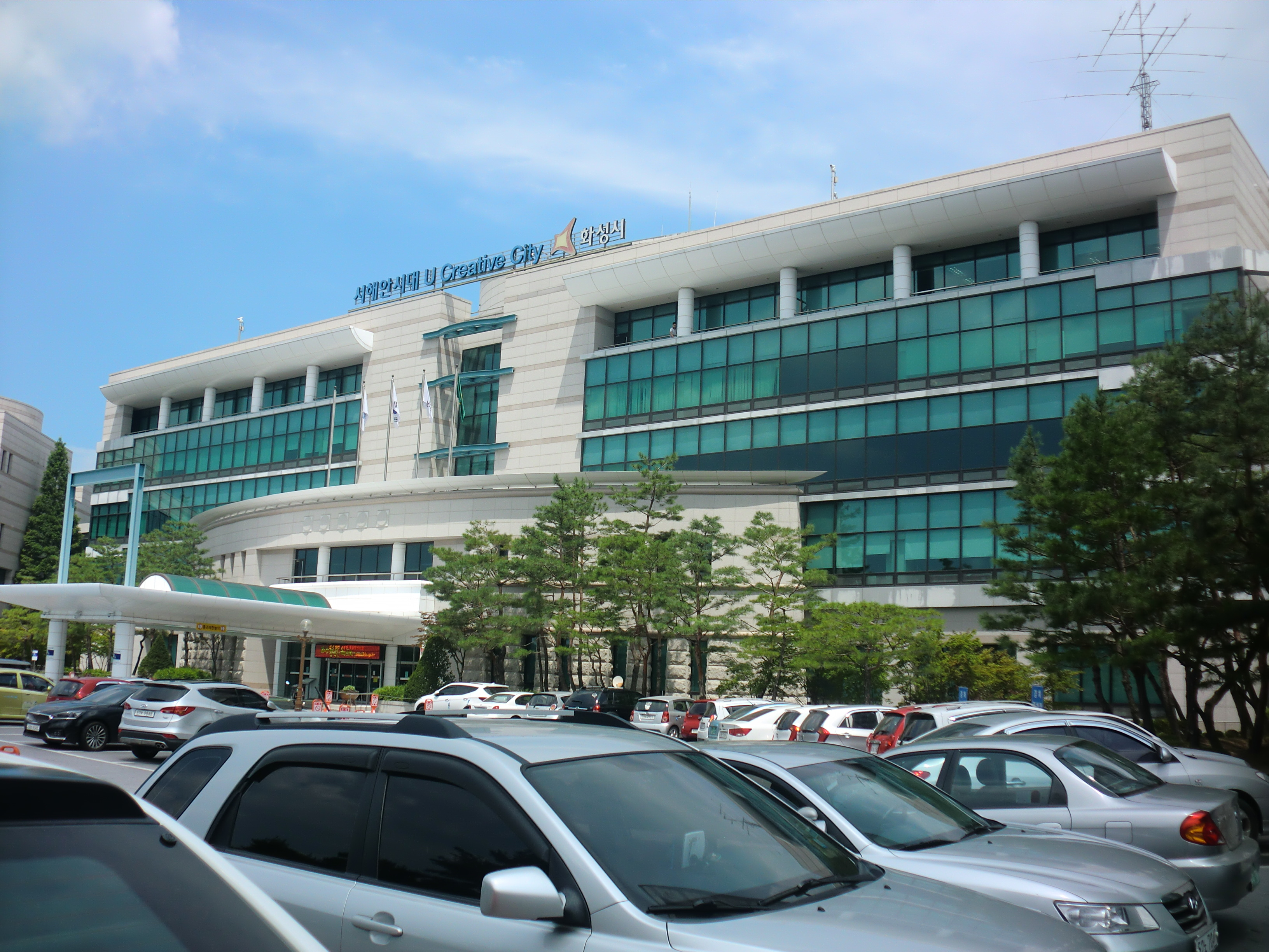 경기도 화성시에 있는 화성시청